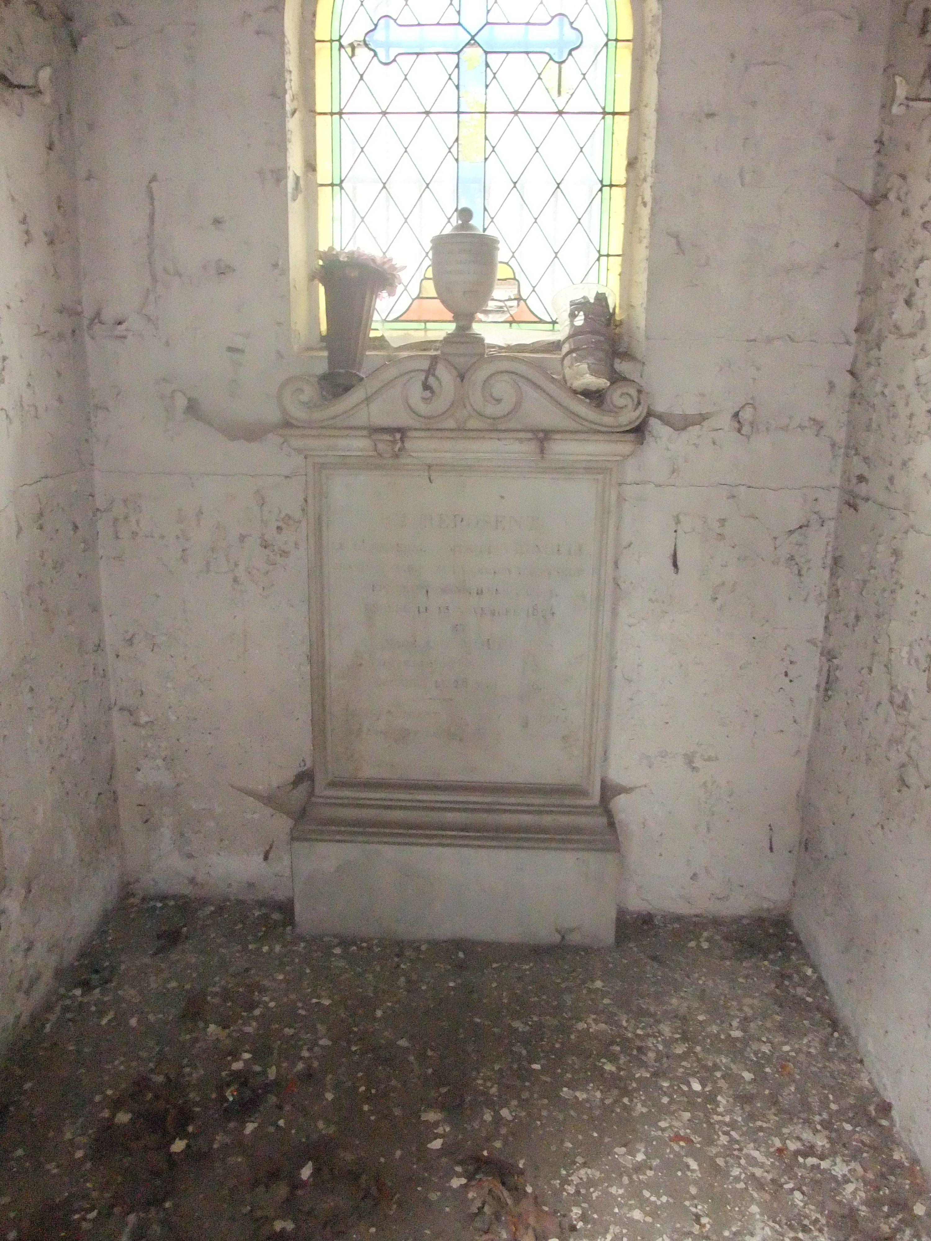 Intérieur de la chapelle